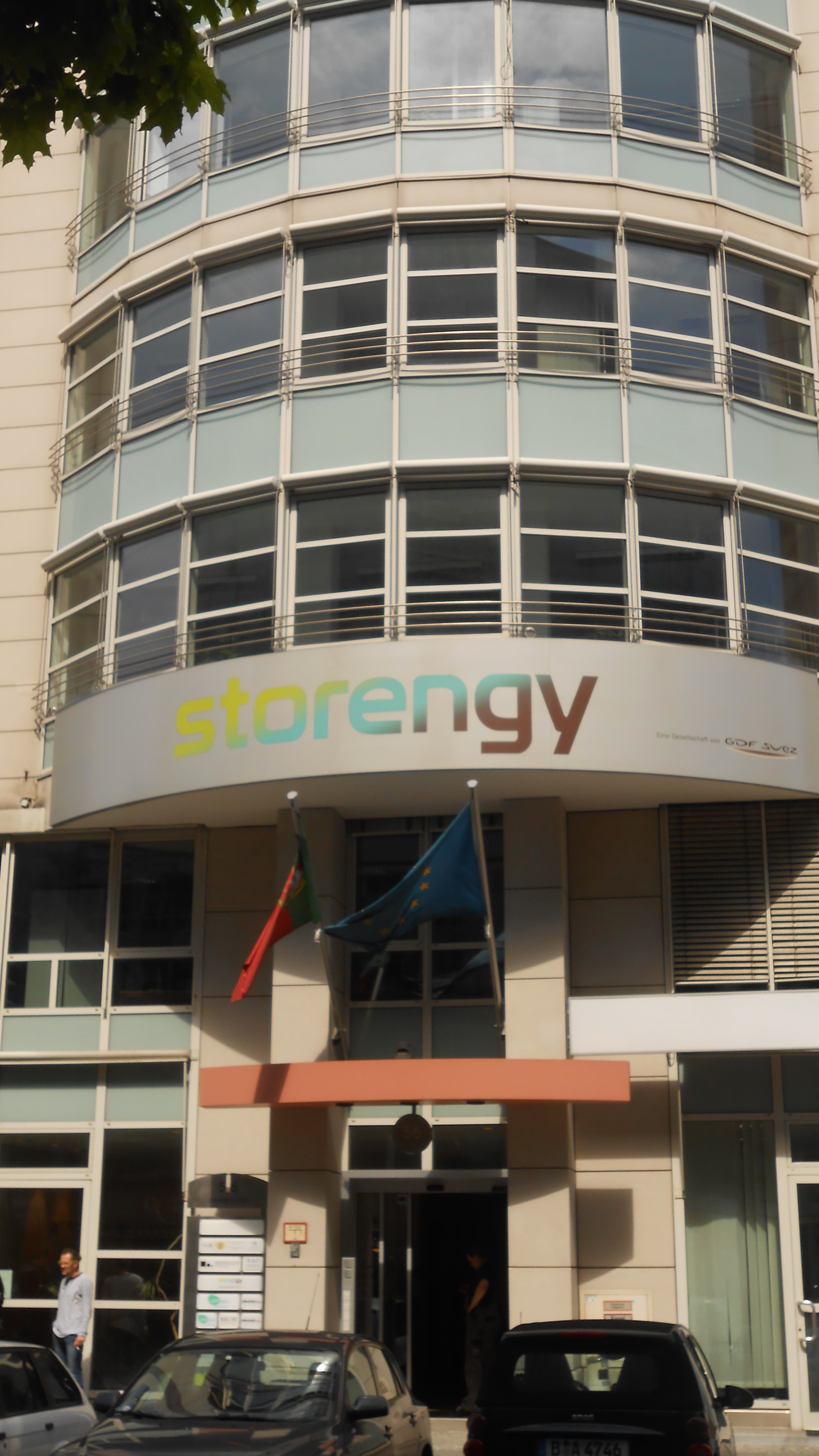 Die Botschaft Portugals in der Zimmerstraße in Berlin-Mitte. Im Bürogebäude sind u.a. auch ein Büro der Tourismusagentur Portugals (Turismo de Portugal) und die portugiesische Außenhandelskammer (AICEP) untergebracht, zudem die Niederlassung der deutschen Storengy, ein Tochterunternehmen des französischen Energiekonzerns Engie (GDF Suez).